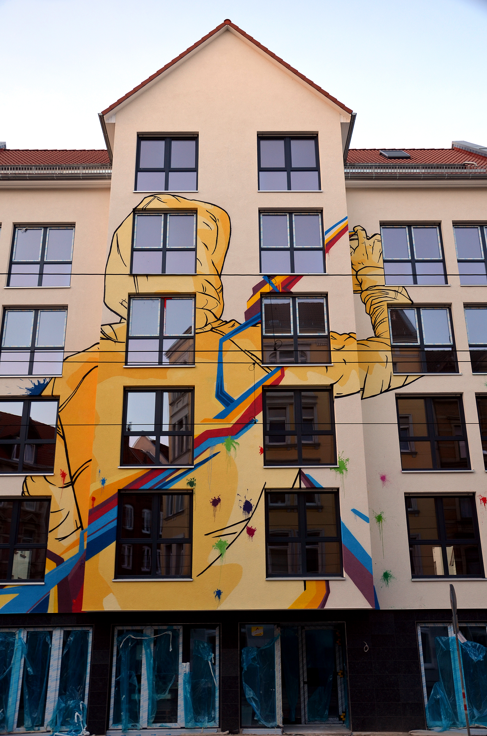 Nachdem Ende 2013 anonyme Vandalen den Neubau des Gebäudes in der Limmerstraße 98 mit Farbbeuteln beworfen hatten, wandte sich der Bauherr Bauteam Management, vertreten durch den Architekten Asghar Jalanesh, an Asghar Eslami vom Kulturverein Kargah. Eslami vermittelte den Kontakt zu dem Künstler Jasha Müller (STREETARTSHIT), der die Farbbeutel-Klekse in die nun geschaffene Graffiti integrierte: Nun ist auf der Fassade die Rückansicht eines mit Kapuzenjacke und Spraydose "bewaffneter anonymen Farbsprühers zu sehen ...